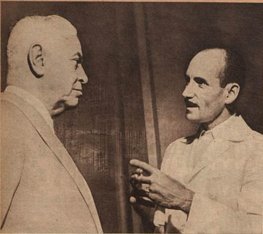 O ex-ministro da Fazenda José Pires do Rio em conversa com o empresário Joaquim Rolla no Palácio Quitandinha.